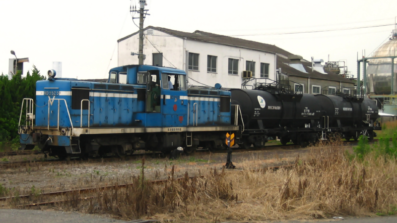 名古屋臨海鉄道昭和町線を通るND5525